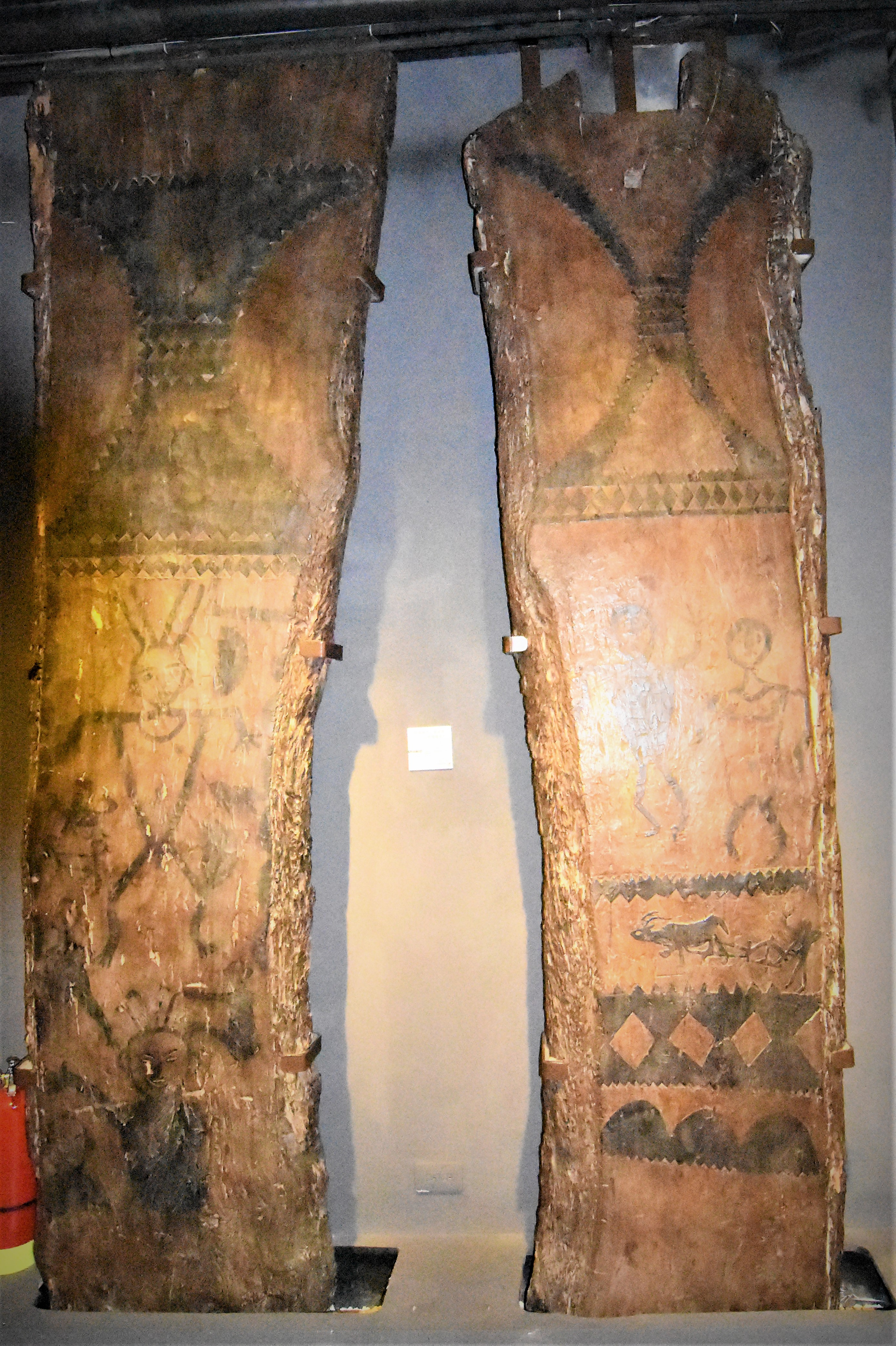 中文（台灣）: 南港區中研院民族學研所-阿美族太巴塱部落Kakitaan祖屋雕刻柱2